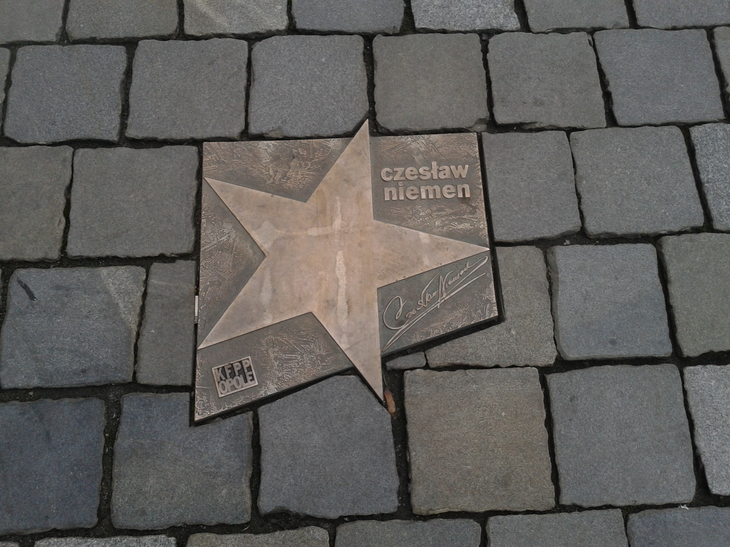 Gwiazda Niemena w Alei Gwiazd Polskiej Piosenki w Opolu.